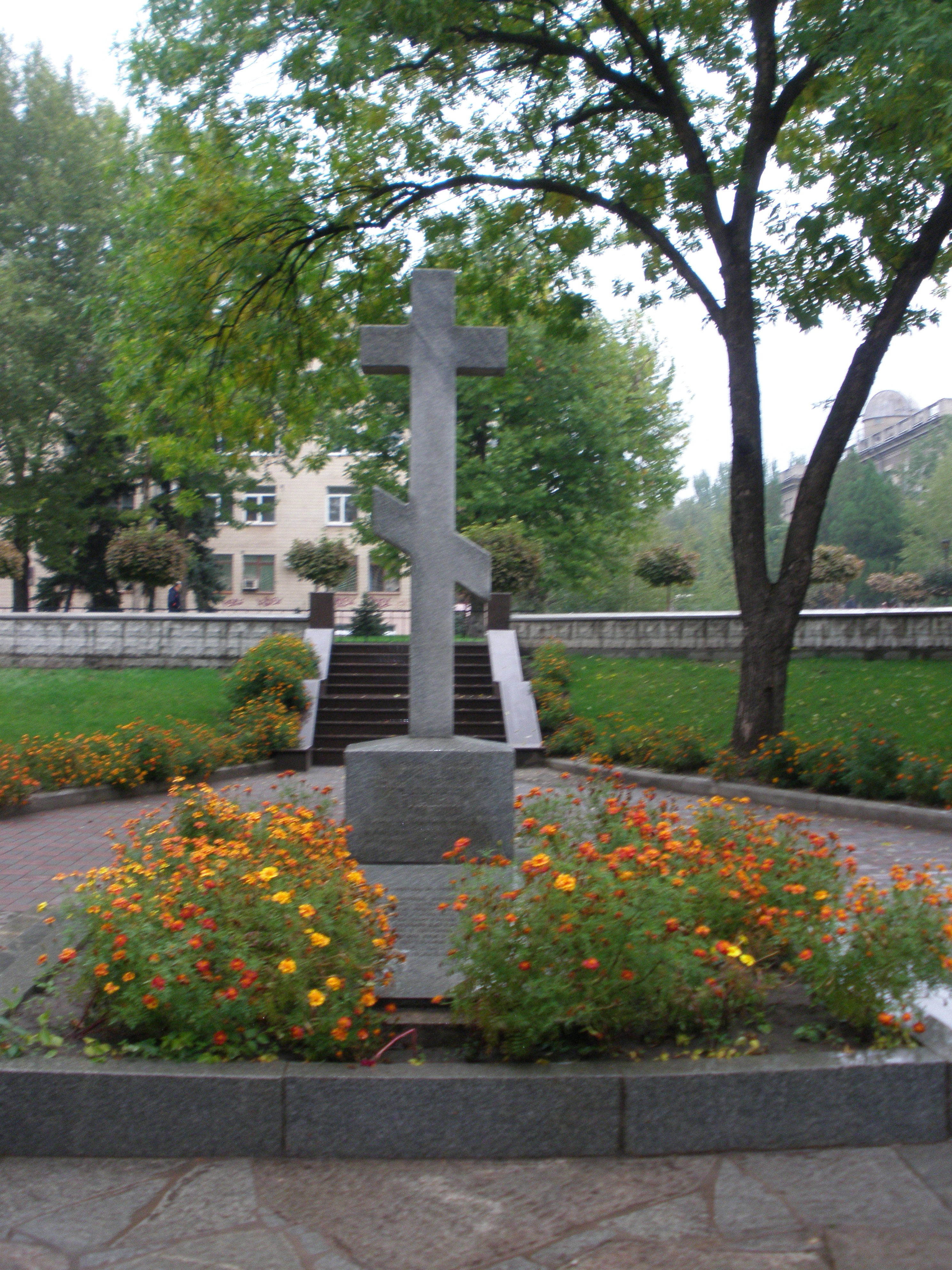 Могила Йосипа Гладкого Запоріжжя